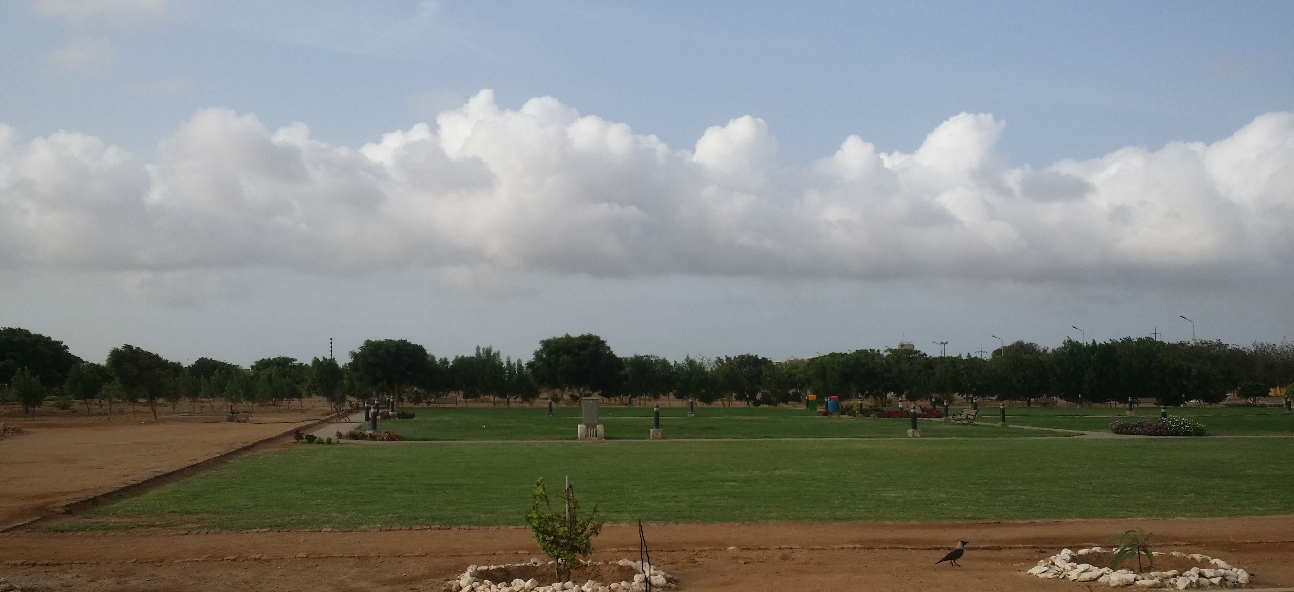 سنڌي: اسٽاف ريززيڊنس بلڊنگ پارڪ